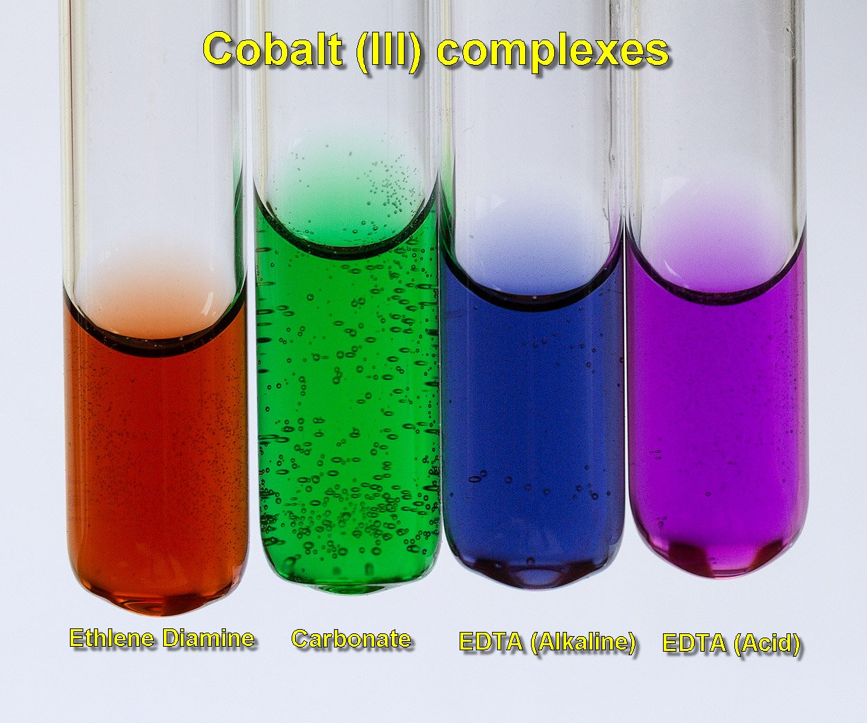 Trong ảnh trên có 4 phức chất: với etylen điamin, với cacbonat, với EDTA (kiềm) và EDTA (axit).